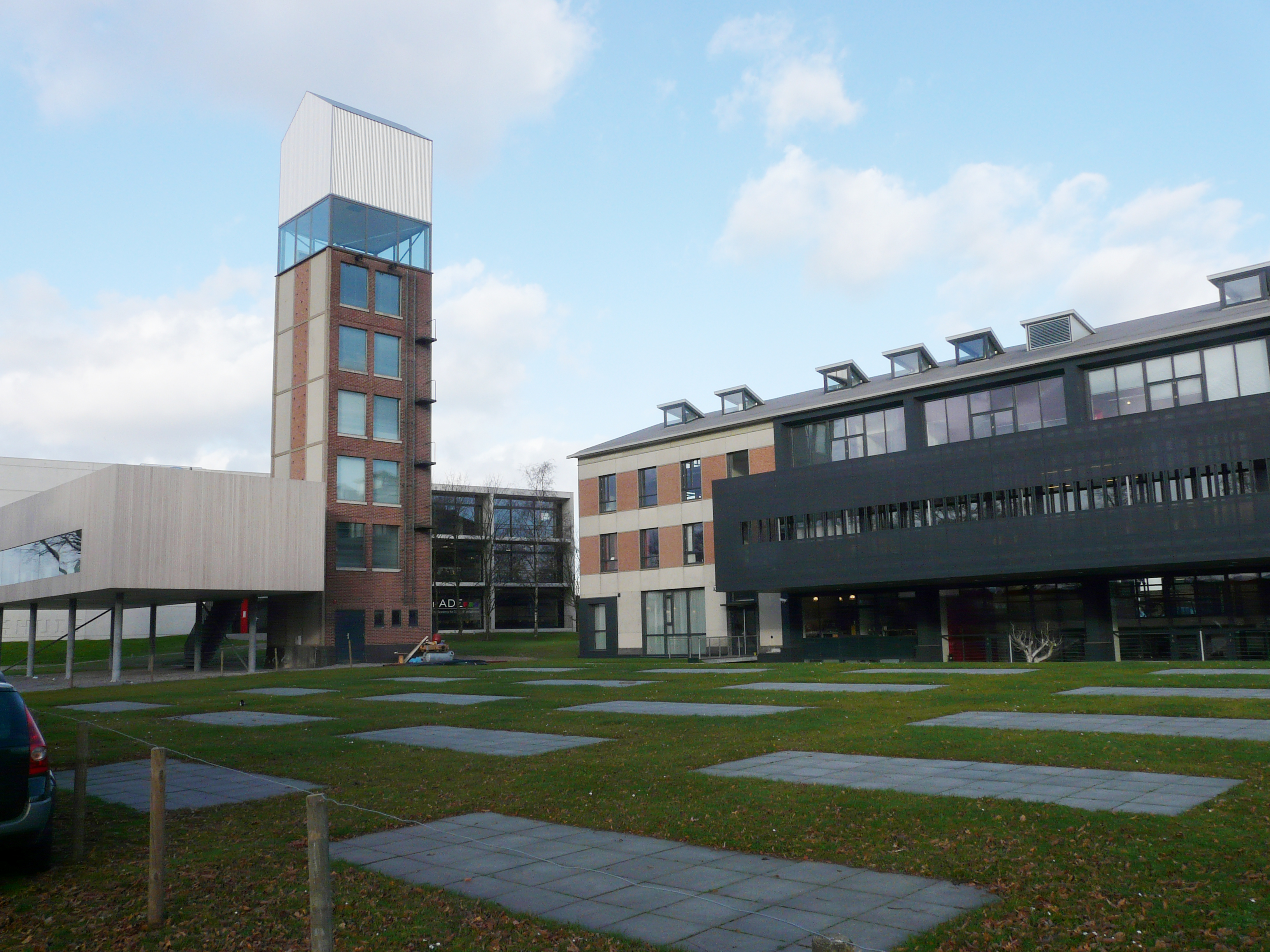 Zicht op deel van de Triple O Campus Breda. Bereikbaar via de Slingerweg, Breda. Gelegen niet ver van Station Breda en het centrum van Breda